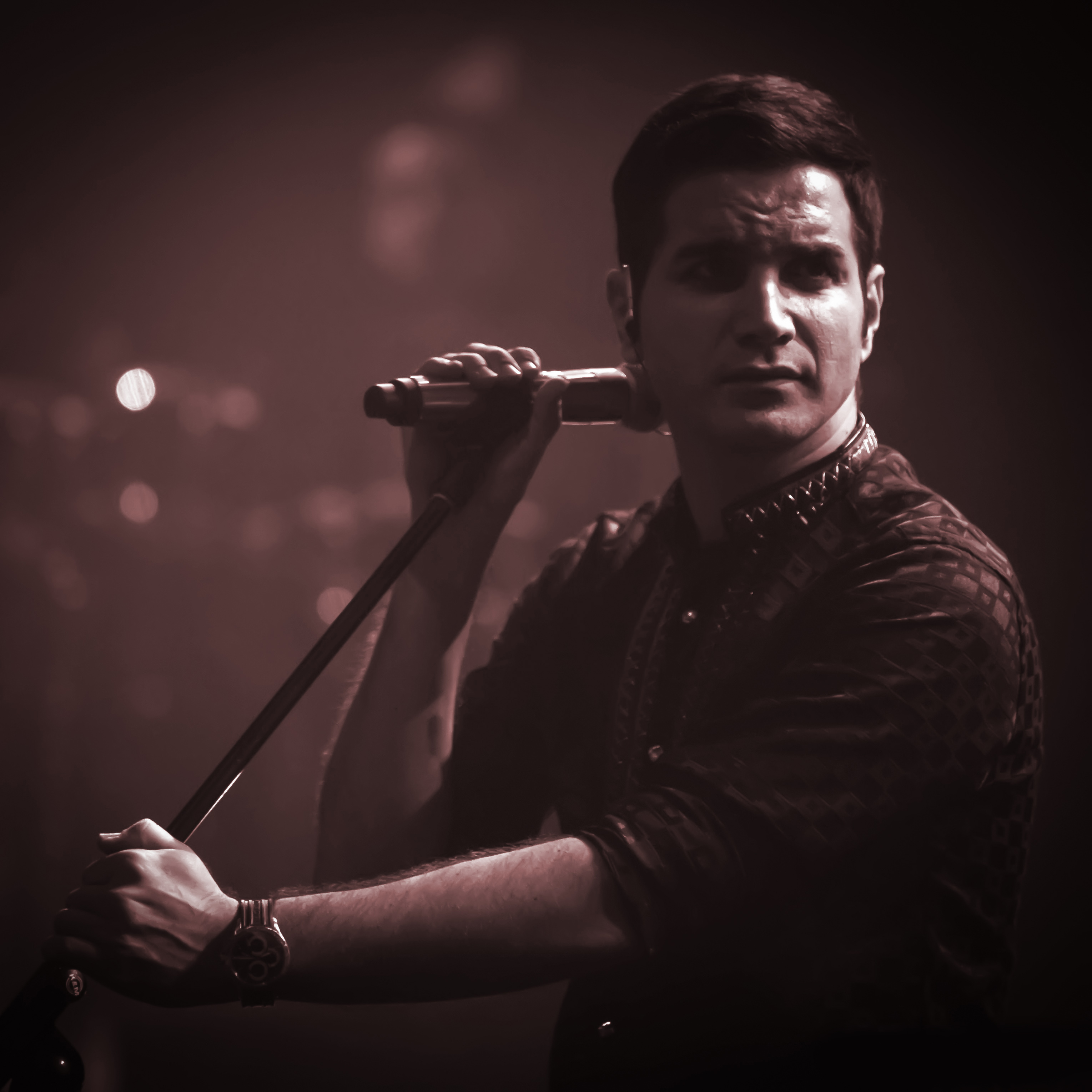 کنسرت محسن یگانه 23 اردیبهشت 1396 در سالن میلاد نمایشگاه بین المللی تهران. عکاس: امیر فرزانه